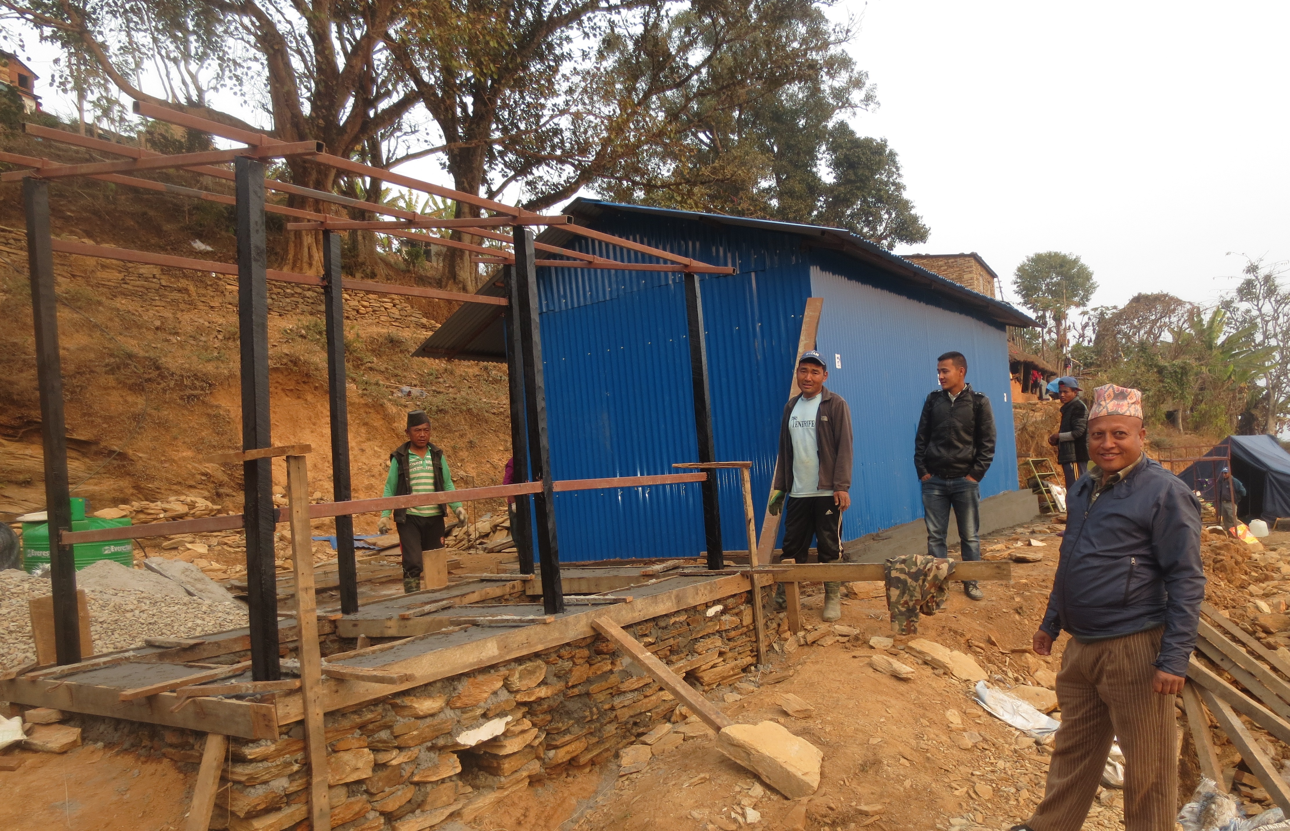 Es wird gebaut in Borlang, Ghorka.